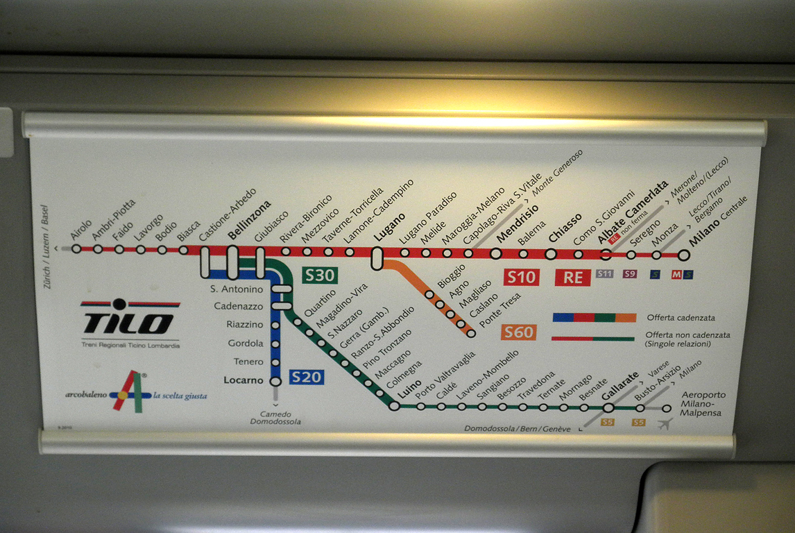 Mappa della "rete celere" del Canton Ticino riportata all'interno di un elettrotreno RABe 524 di TILO